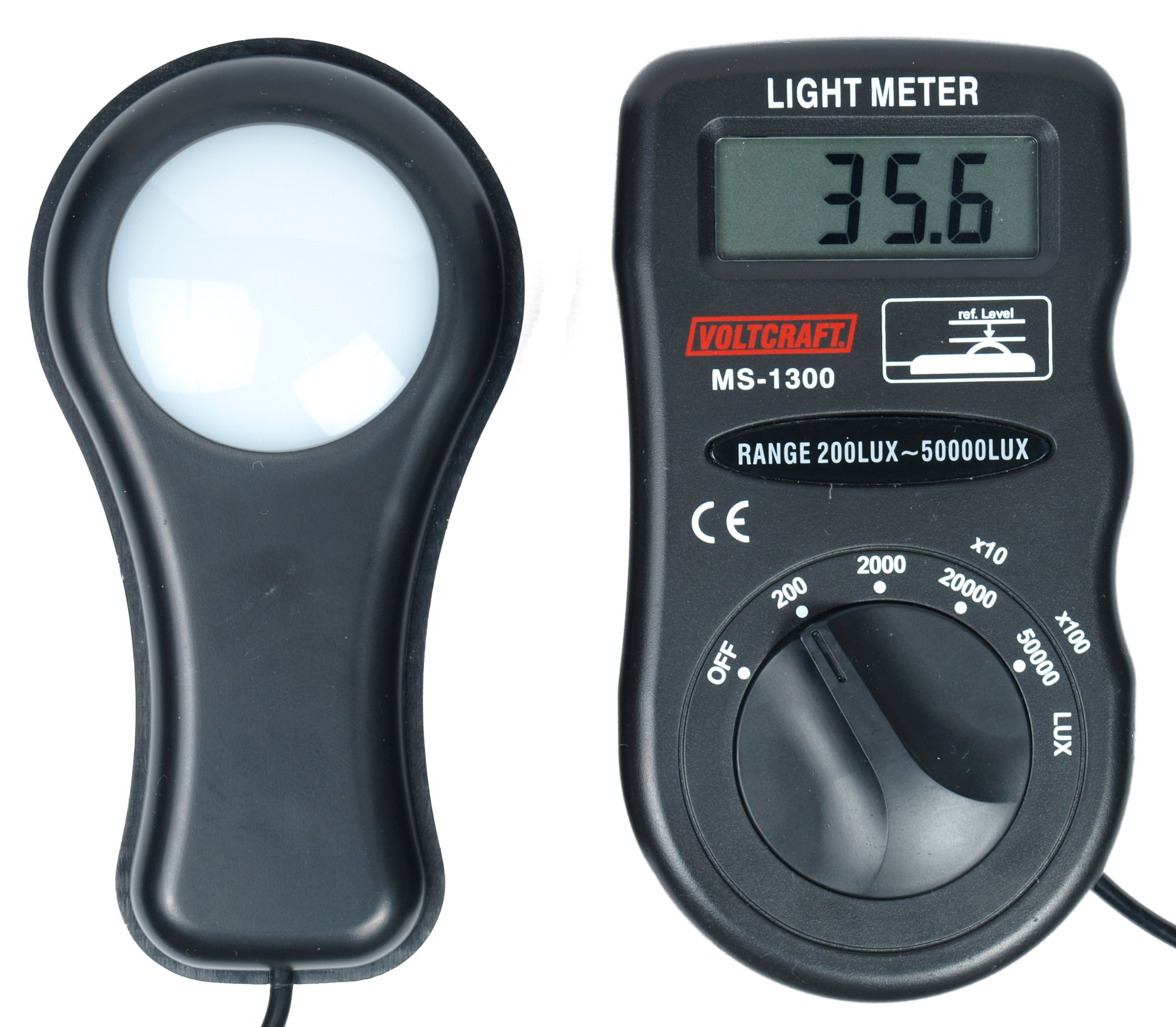 Fotometer mit einem Messbereich von 0.1–50000 Lux